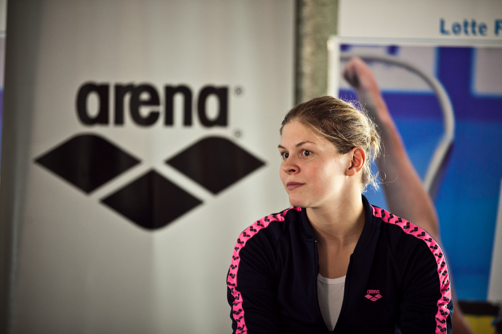 Svømmeren Lotte Friis i Hørsholm, Danmark, 4. april 2011.